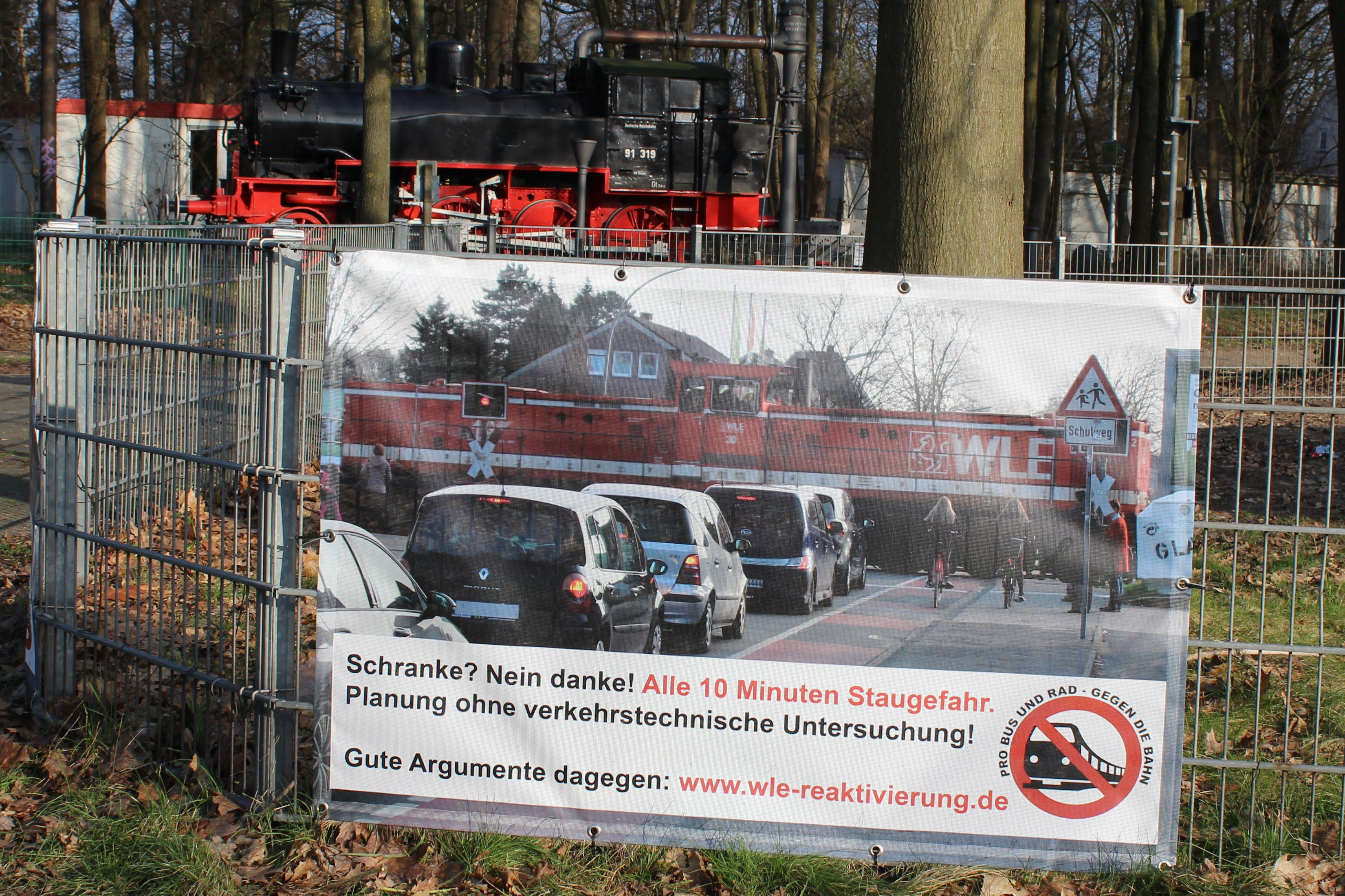 Einer von vielen Banner gegen die WLE-Reaktivierung einer Bürgerinititative